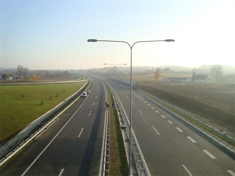 Autoput BL-Gradiška u okolici GD